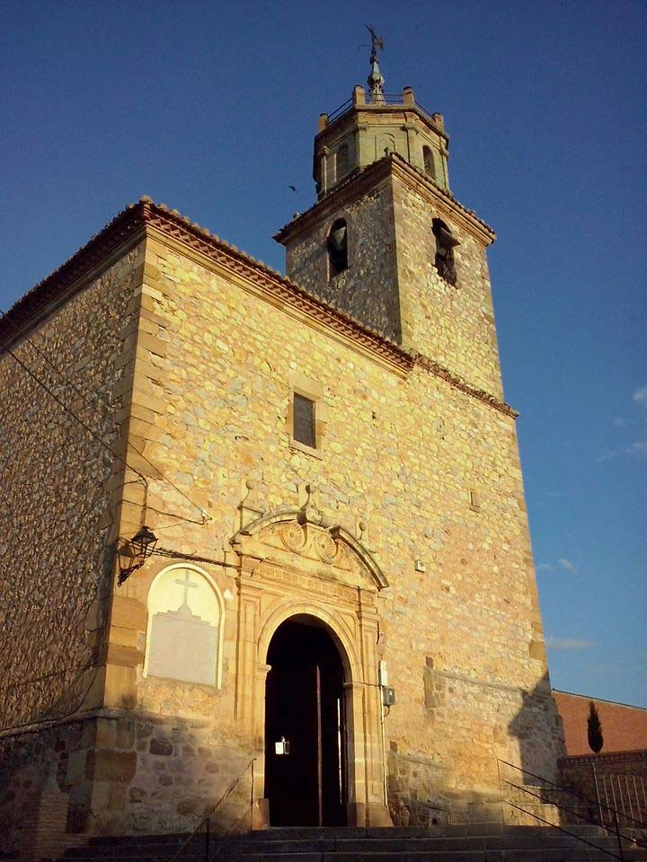 Entrada principal de la iglesia parroquial del pueblo Campillo de Dueñas(Guadalajara).